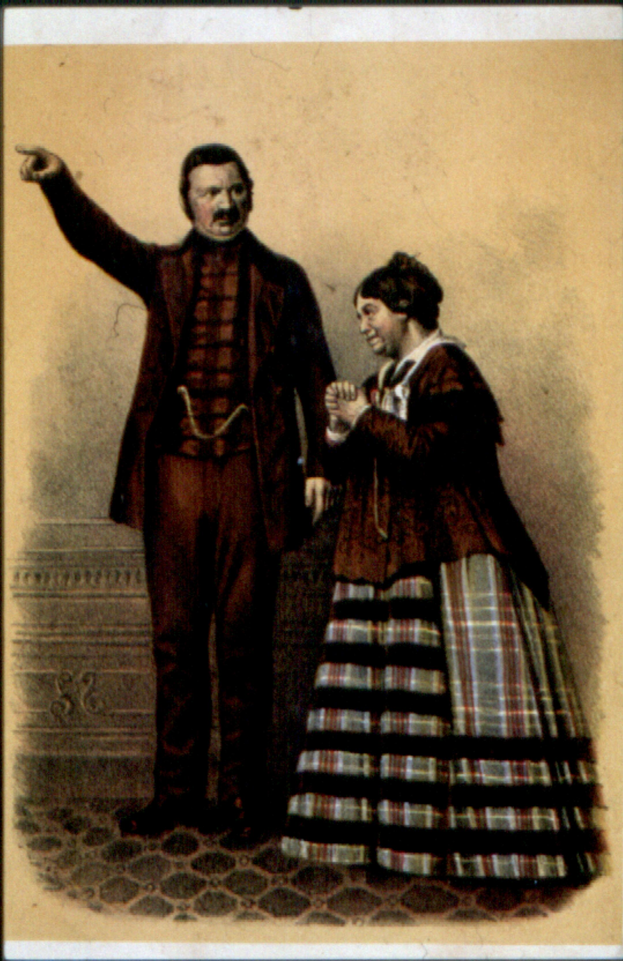 Chromolithographie mit der Unterschrift "Herr Kinder als Polizist Gaedchens und Frau Lotte Mende-Müller als Tante Therese". In: Julius Stinde: Hamburger Leiden. Localer Schwank in 5 Acten. Altona: Verlagsbureau (A. Prinz) 1875. Scan von --Goerdten 10:31, 8. Jan. 2007 (CET)